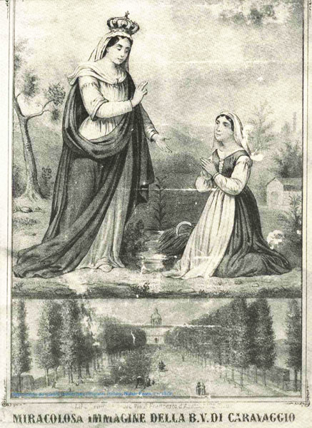 Gravura de Nossa Senhora de Caravaggio, trazida da Itália por Natal Faoro e datada de 1724, inicialmente ocupou o altar da primeira capela. Capela-mor da antiga Matriz de Caravaggio, Farroupilha, Brasil